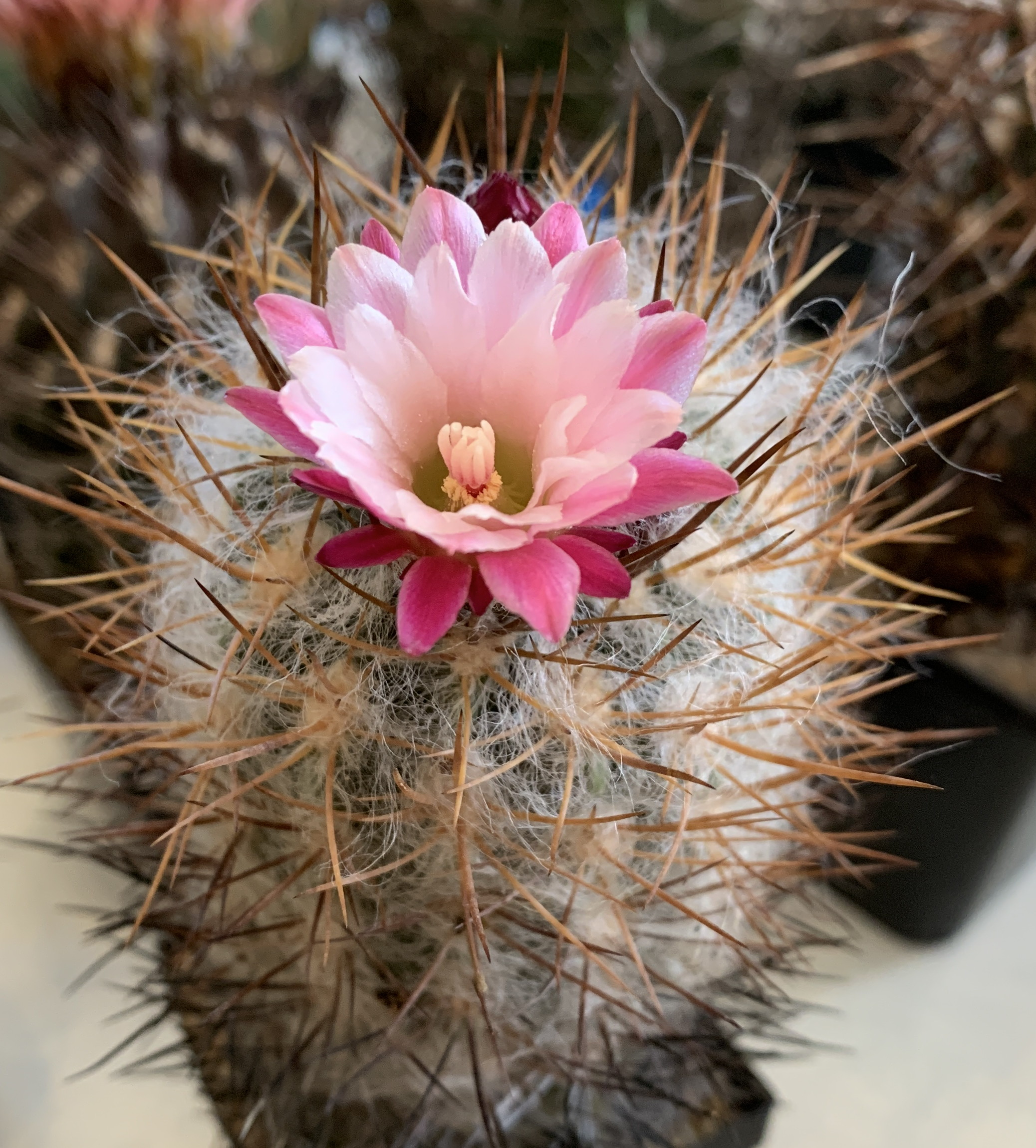 Eriosyce floccosa, in Kultur